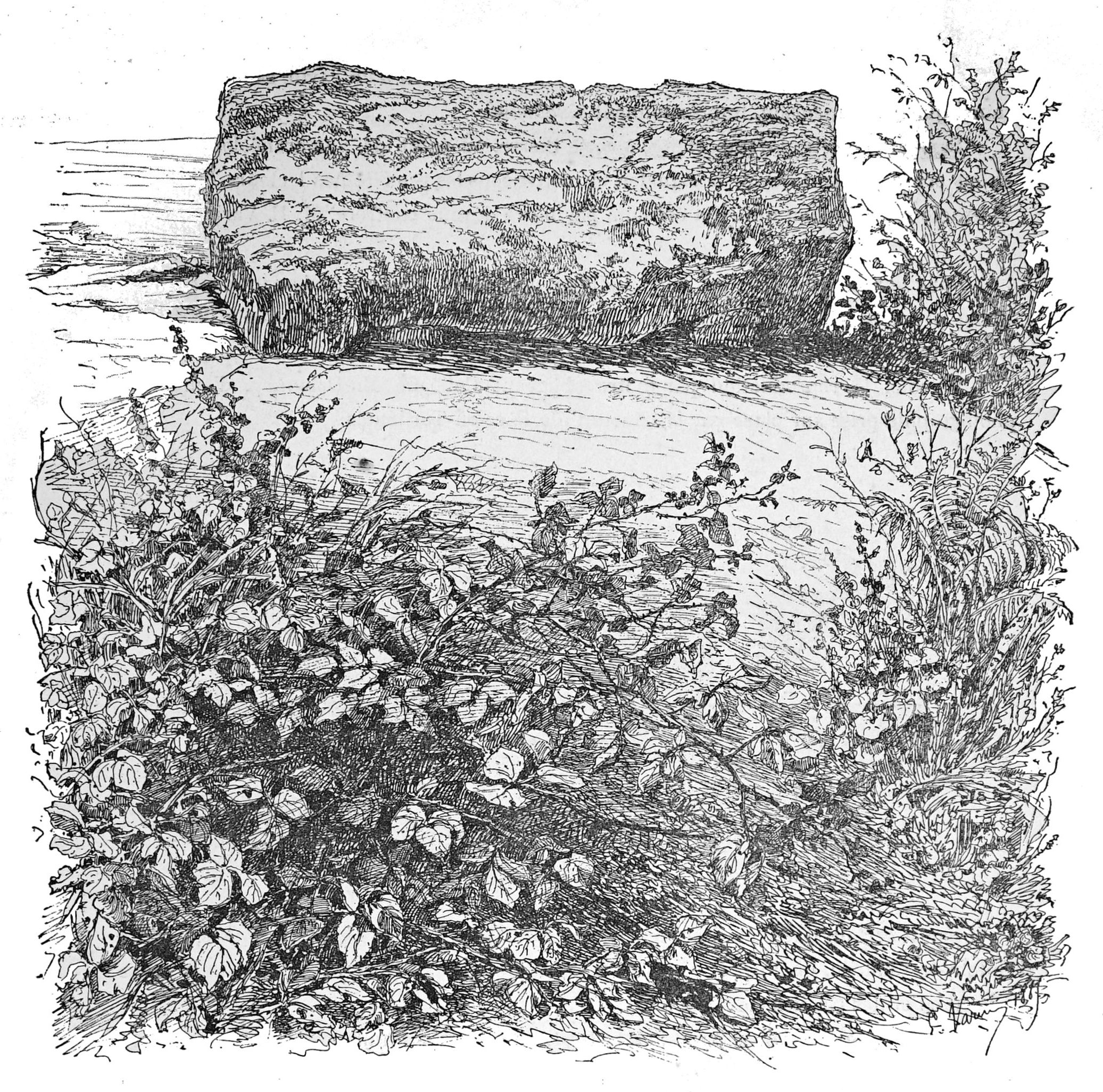 découvert lors de fouilles de F. Moreau.